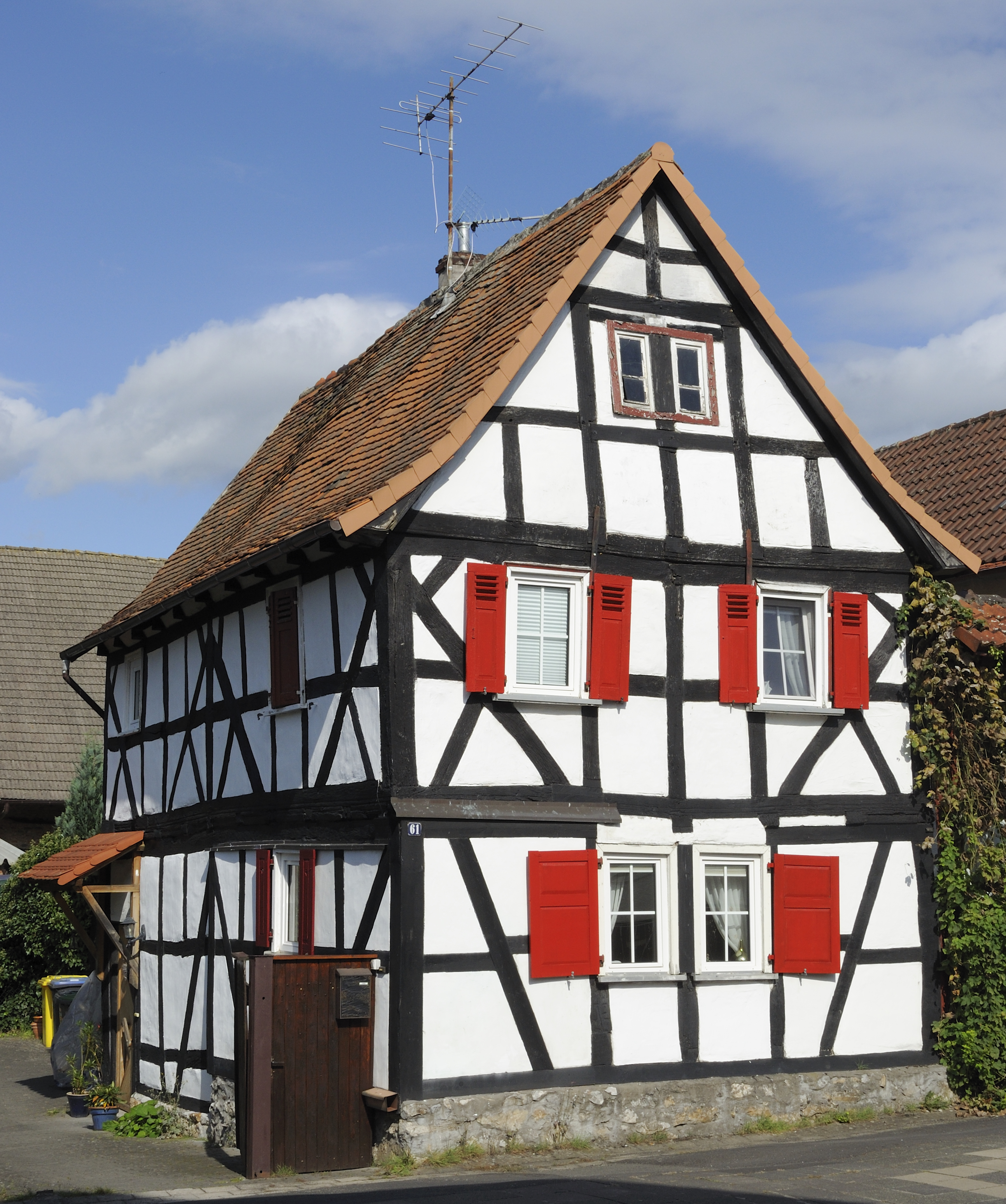 Dieses Foto entstand im Rahmen des Projekts Wiki Loves Monuments Mittelhessen, das aus dem Community-Projektbudget von Wikimedia Deutschland e. V. gefördert wurde.